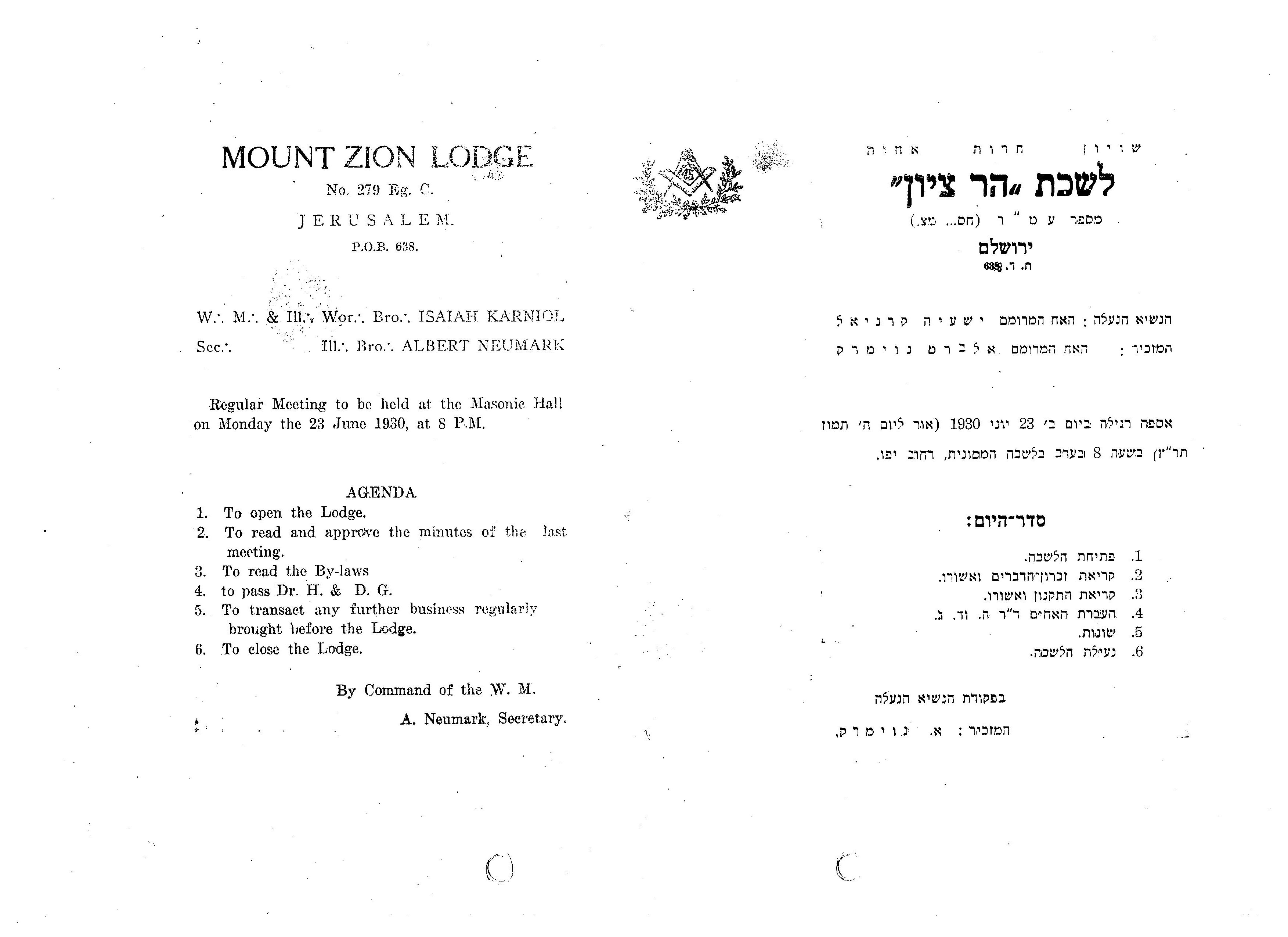 אגרת משנת 1930, של אסיפת לשכת הר ציון (הבונים החפשיים)